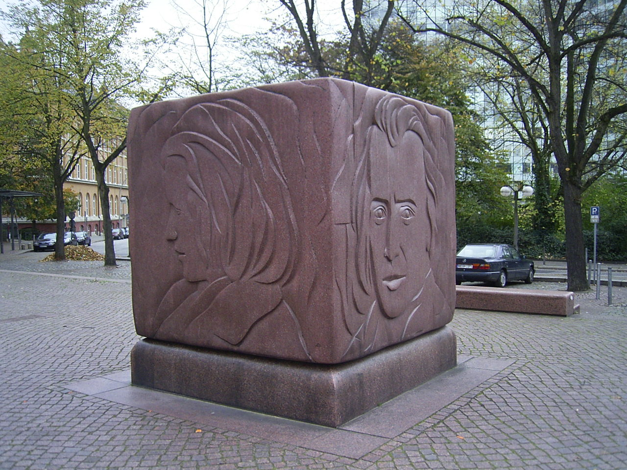 Granitwürfel mit vier Bildnissen von Johannes Brahms, Künstler: Th. Darboven, vor der Laeiszhalle in der Hamburger Neustadt.